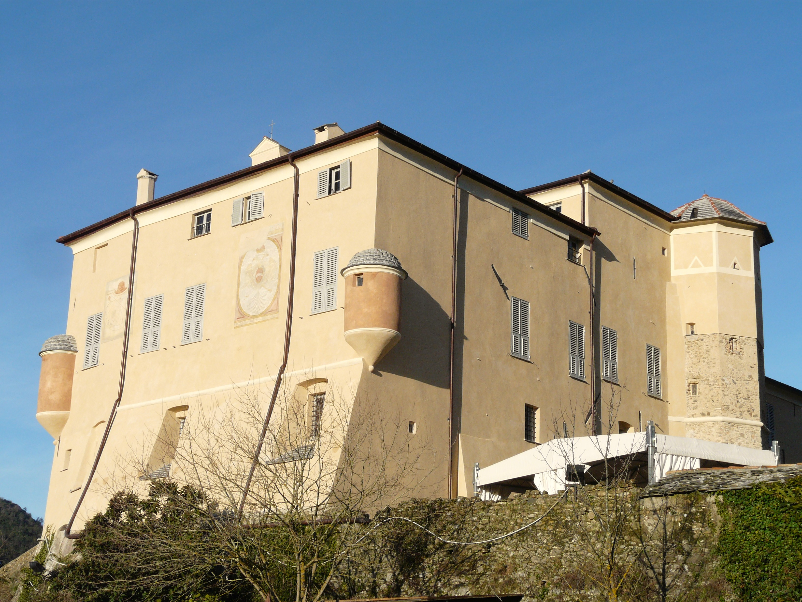 Castello di Garlenda, Liguria, Italia